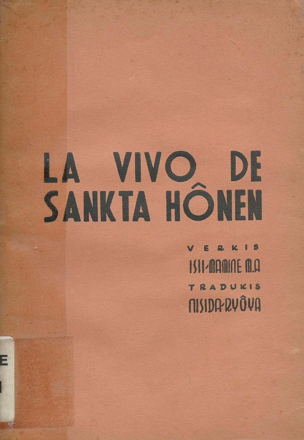 librokovrilo de "La Vivo de Sankta Hônen", 1937